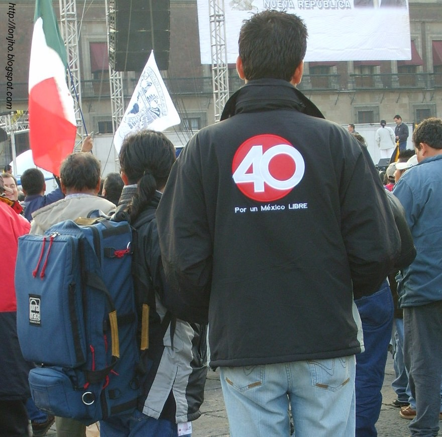 Vestimenta de los Reporteros de Proyecto 40